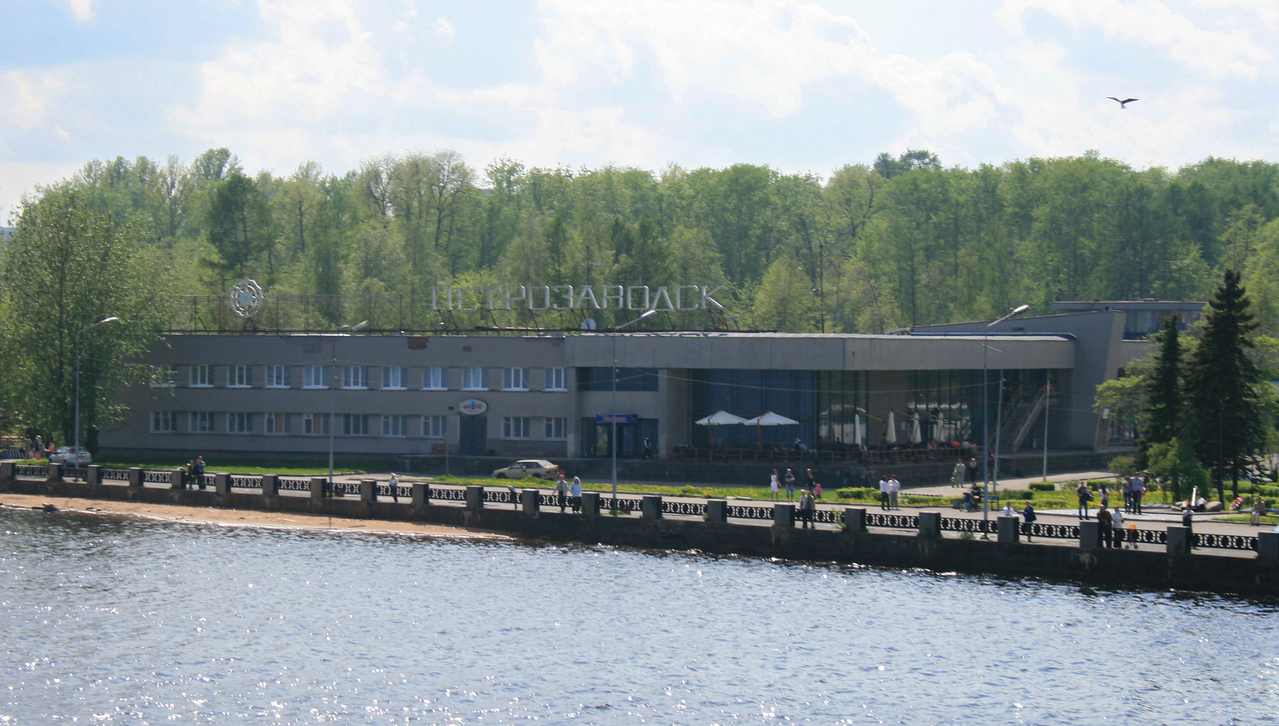 Петрозаводский водный вокзал.